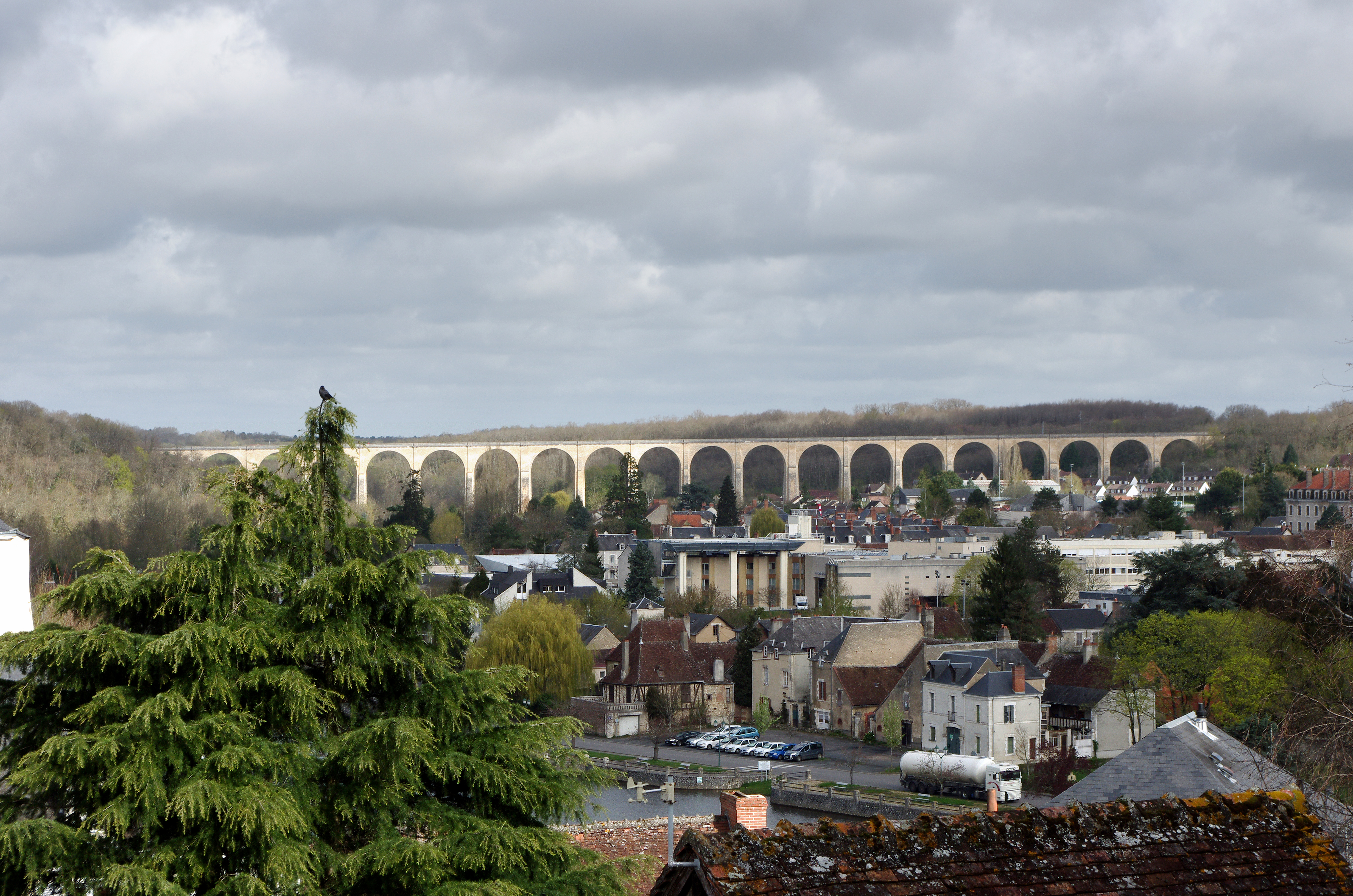 Le Blanc (Indre). Viaduc ferroviaire du Blanc. Il faisait partie de la ligne secondaire Le Blanc-Poitiers; le premier train circula à l'achèvement complet de la ligne en 1889. Le viaduc, d'une longueur de 528 mètres, datant de 1886, permettait à une voie ferroviaire unique de franchir la Creuse. Le trafic a été complètement arrêté en 1990, et le viaduc transformé en voie verte dans les années 2000. Pour sa construction, les architectes Bleynie, Charles Dupuy et Bonnemère, ont utilisé des moellons fournis par les carrières proches de Saint-Aigny et de Rauderie. Les pierres du parement viennent des carrières de Saint-Savin et Chauvigny. Le viaduc est composé de 21 arches de 20 mètres d'ouverture. La hauteur au dessus de la Creuse est de 38 mètres.